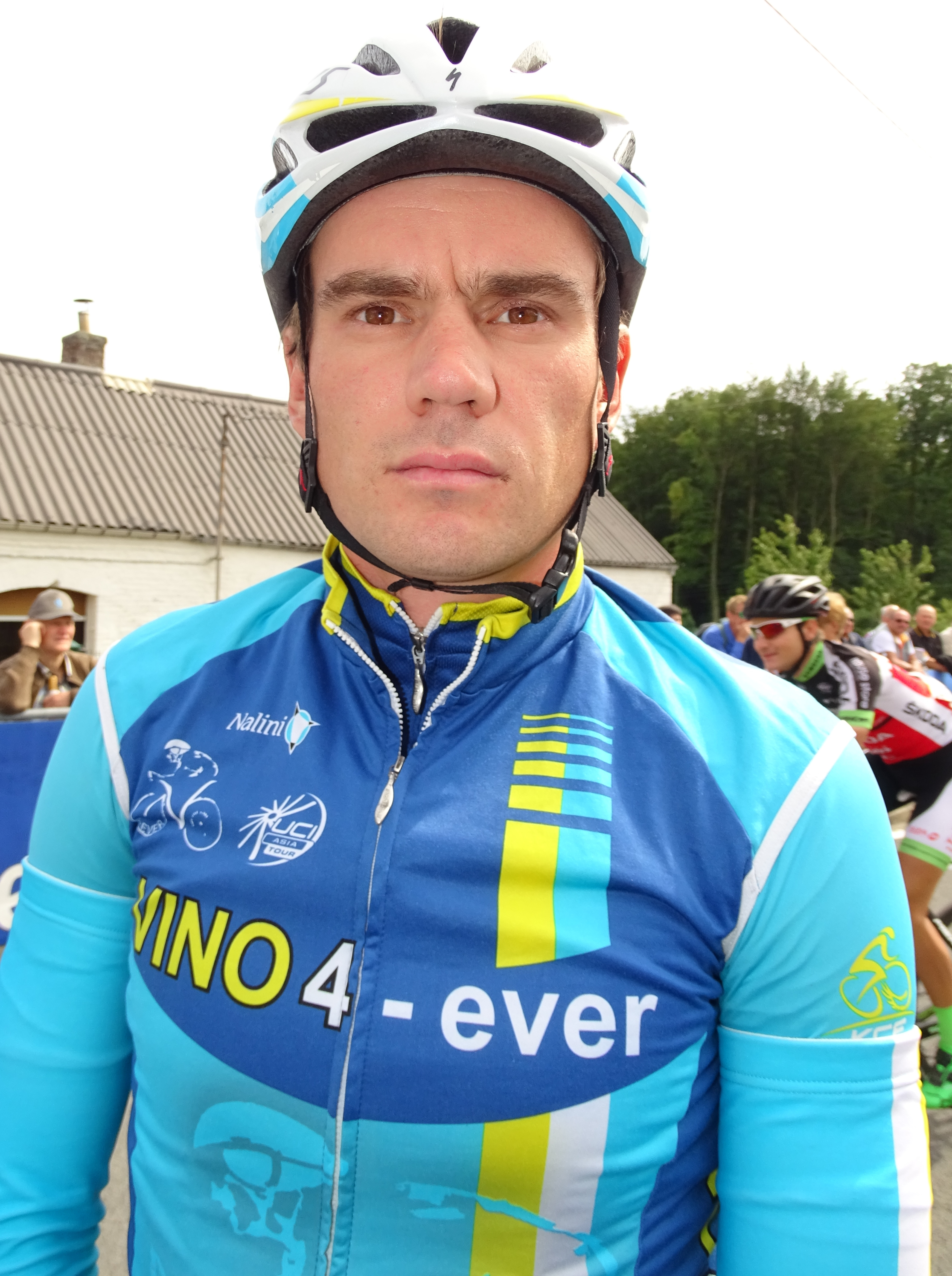 Reportage réalisé le mardi 25 août à l'occasion du départ et de l'arrivée du Grand Prix des Marbriers 2015 à Bellignies, Nord-Pas-de-Calais, France.